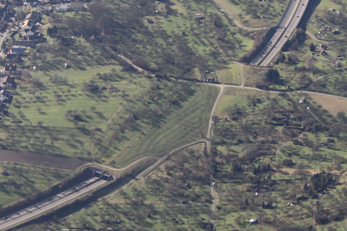 Grünbrücke B 29 bei Schorndorf 48.822415,9.531534